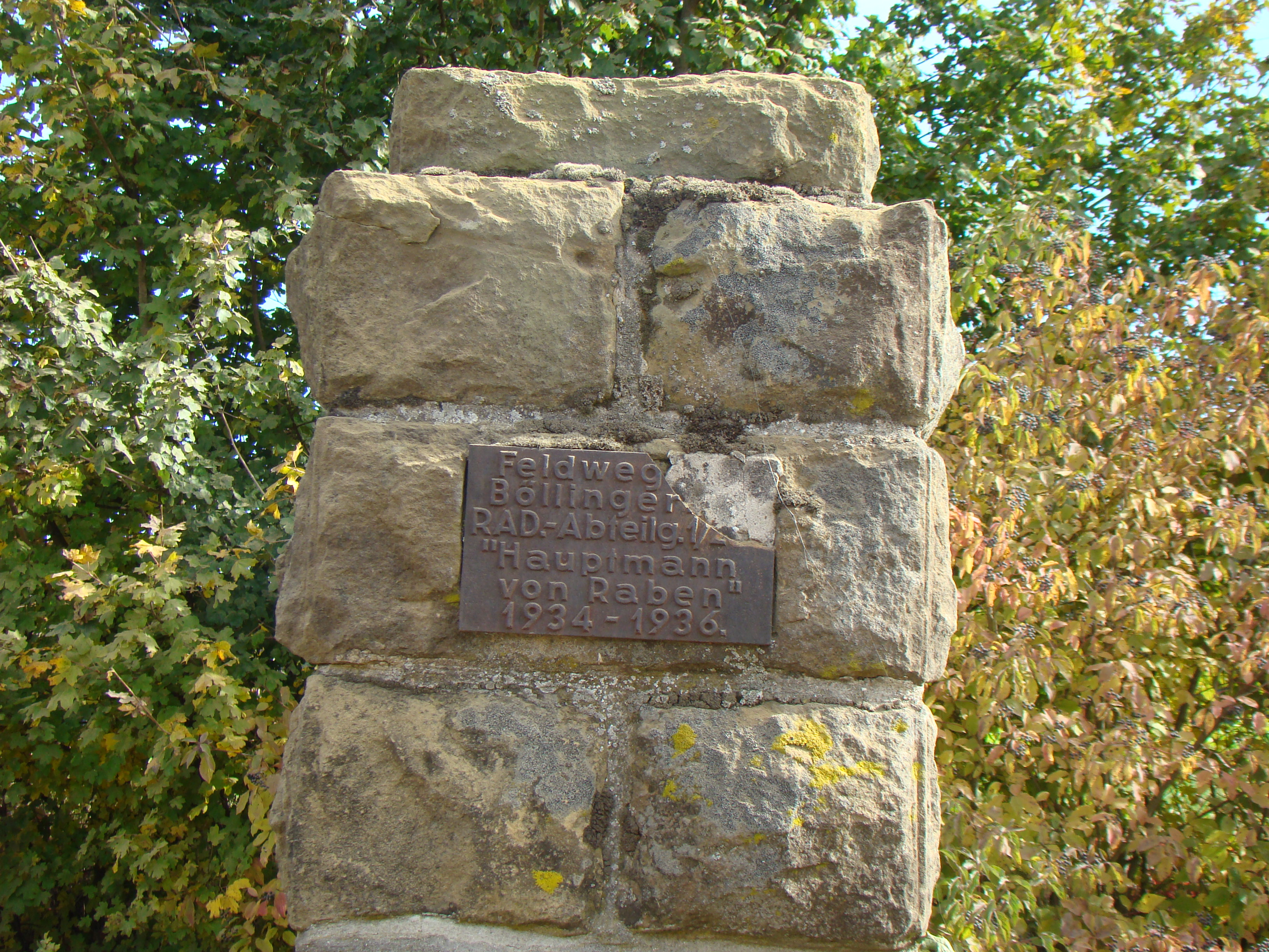 Erinnerungstafel an den Feldwegbau zum Böllinger Hof durch die RAD-Abteilung „Hauptmann von Raben" 1934-36